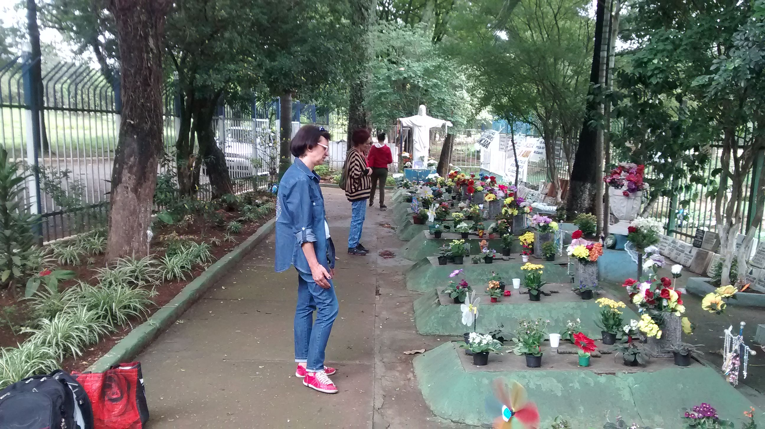 Vista do recanto do Cemitério São Pedro, na Vila Alpina, destinado às 13 almas que morreram no incêndio do Edifício Joelma, a 1 de fevereiro de 1974, em São Paulo.